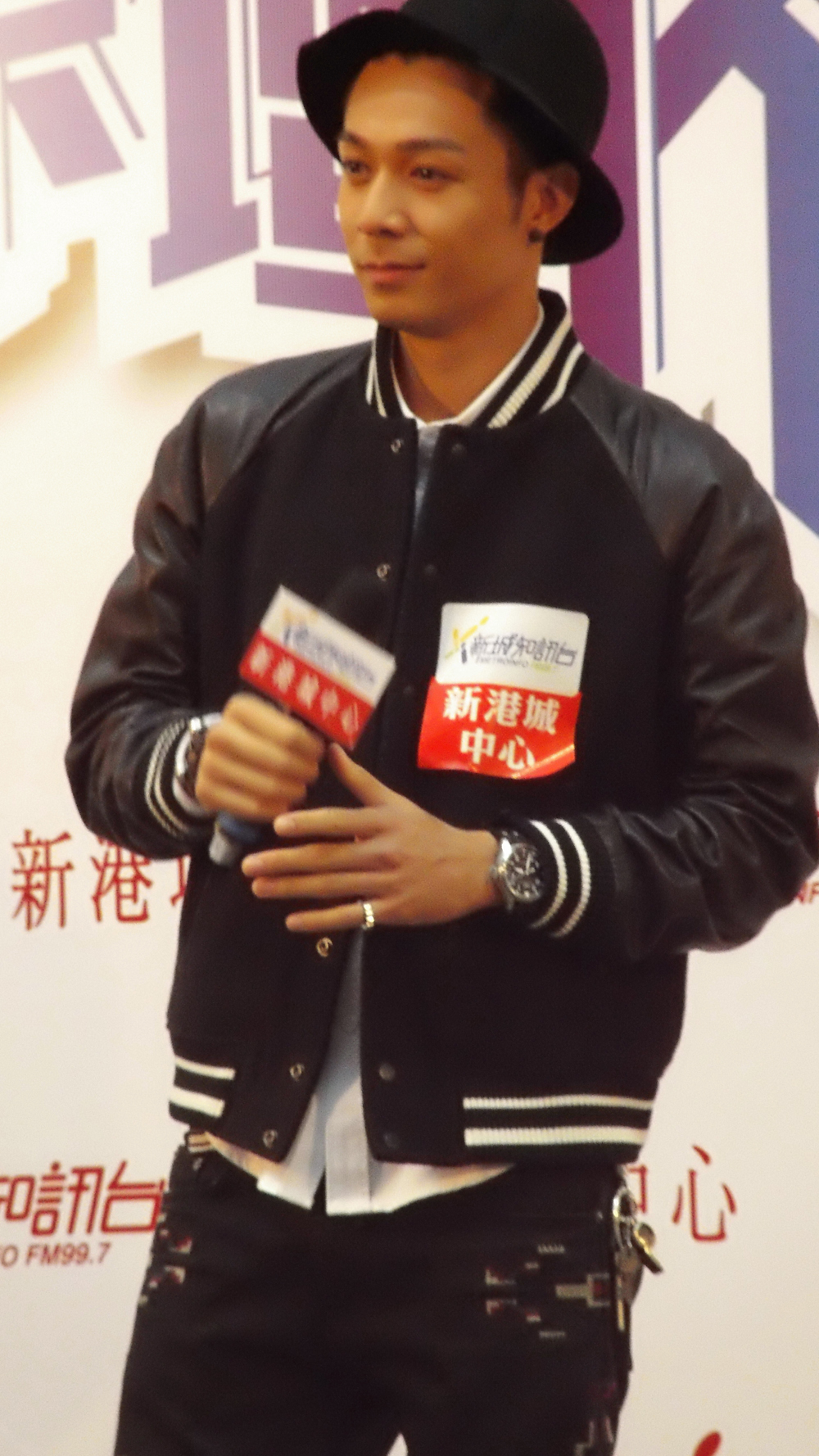 中文（香港）: 周柏豪的樣子